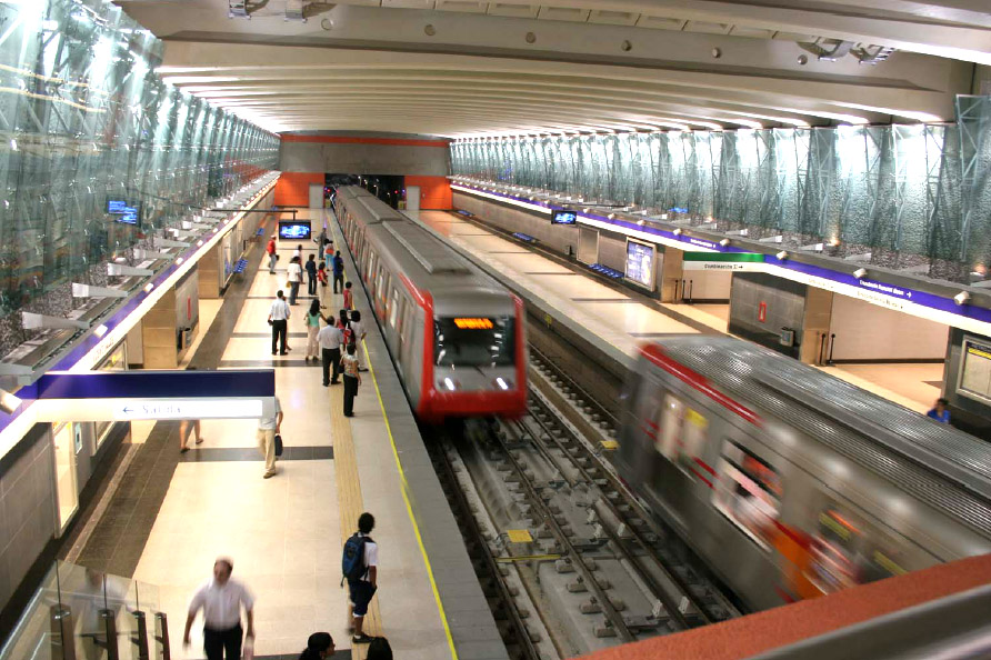 Linea 4 Metro de Santiago